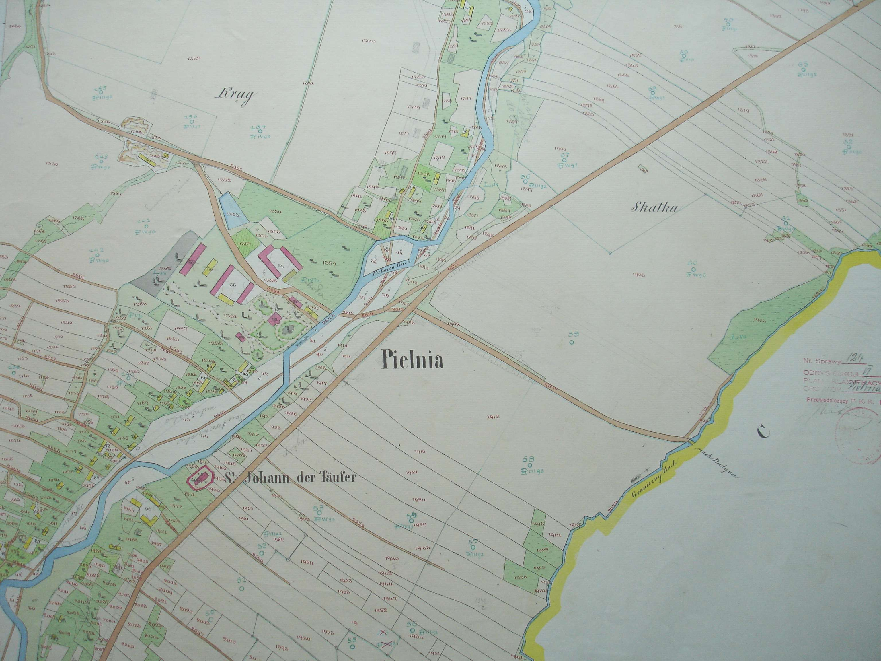 Pielnia, 1852, cadastral map of village Pielnia